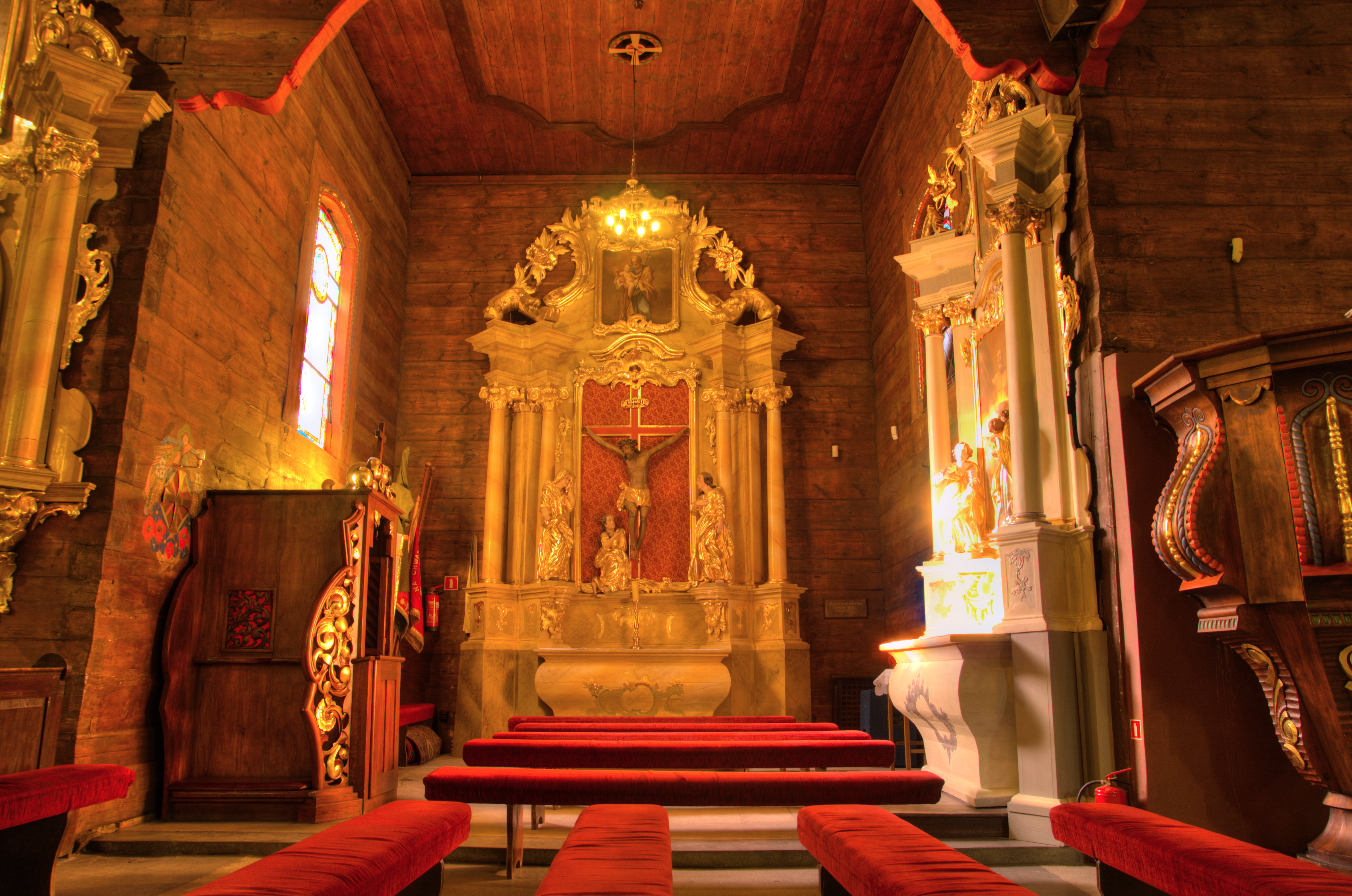 kościół par. pw. św. Andrzeja Apostoła, drewniany z lat 1670-73, 1756 Brody, Brody 130, Lwówek